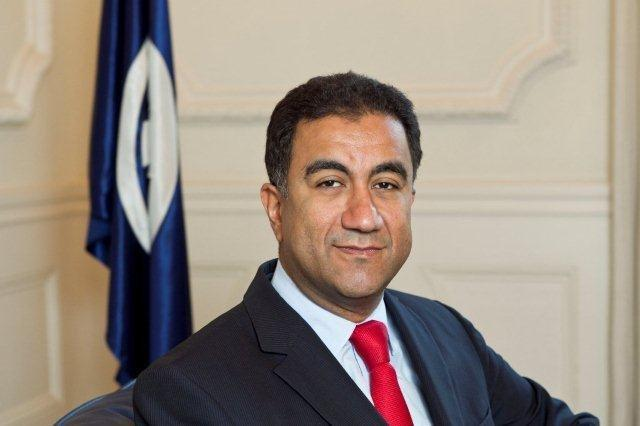 M. Fathallah Sijilmassi, secrétaire général de l'Union pour la Méditerranée.